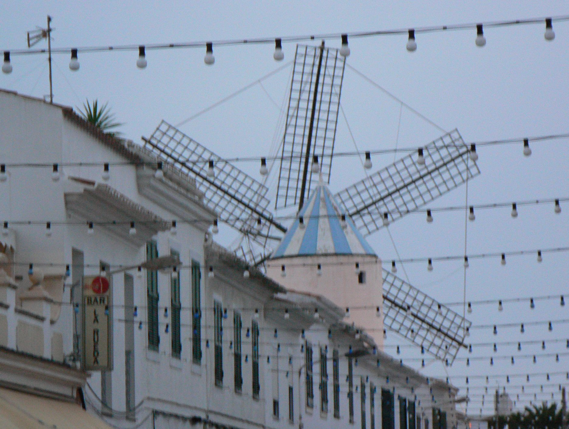 Carrer de Sant Lluís amb el Molí de Dalt al fons, vist pel darrera. El carrer està engalanat amb llums per les festes majors de Sant Lluís.